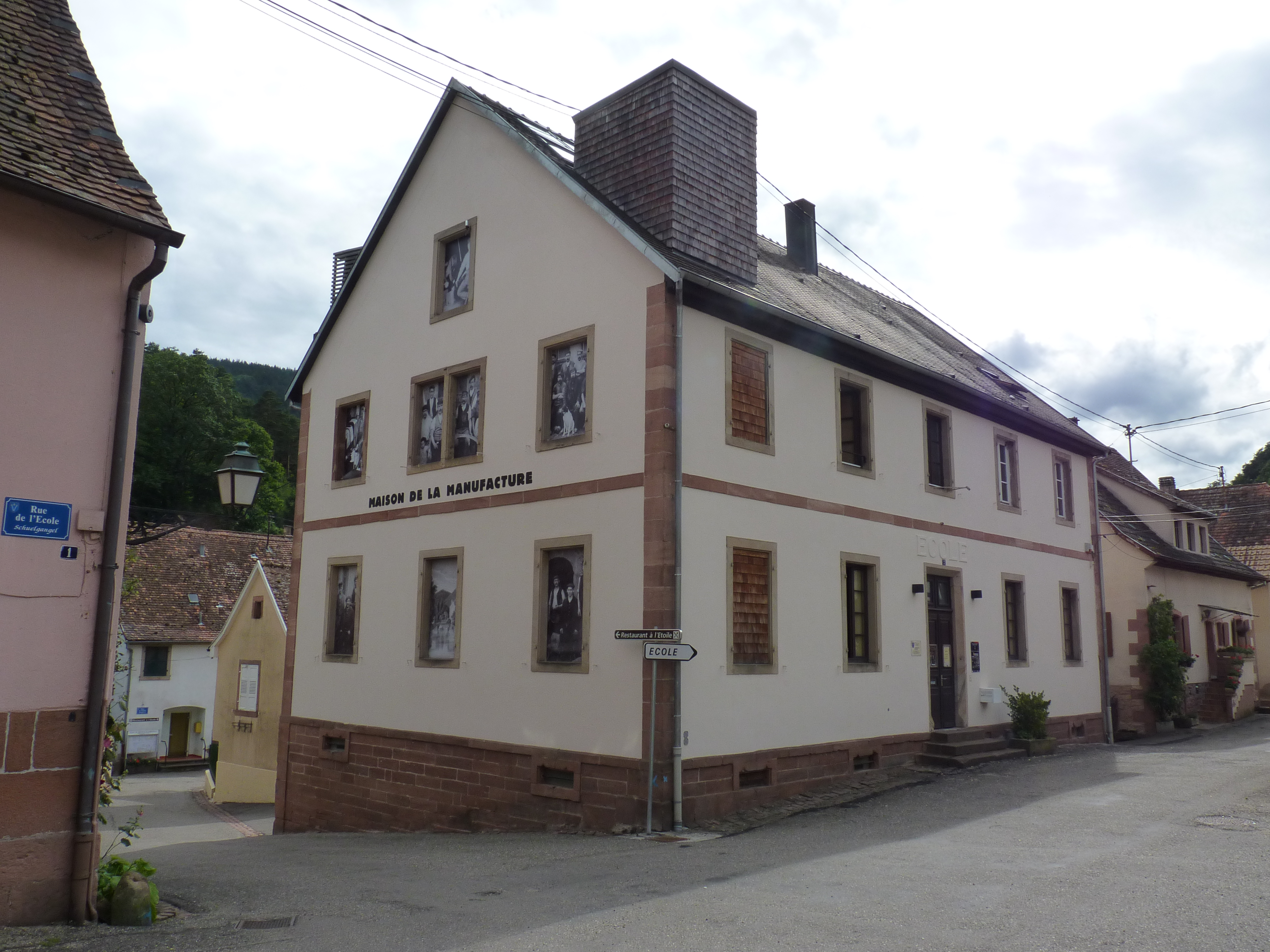 Alsace, Bas-Rhin, Boersch, Ancienne manufacture royale d'armes blanches de Klingenthal transformée aujourd'hui en musée